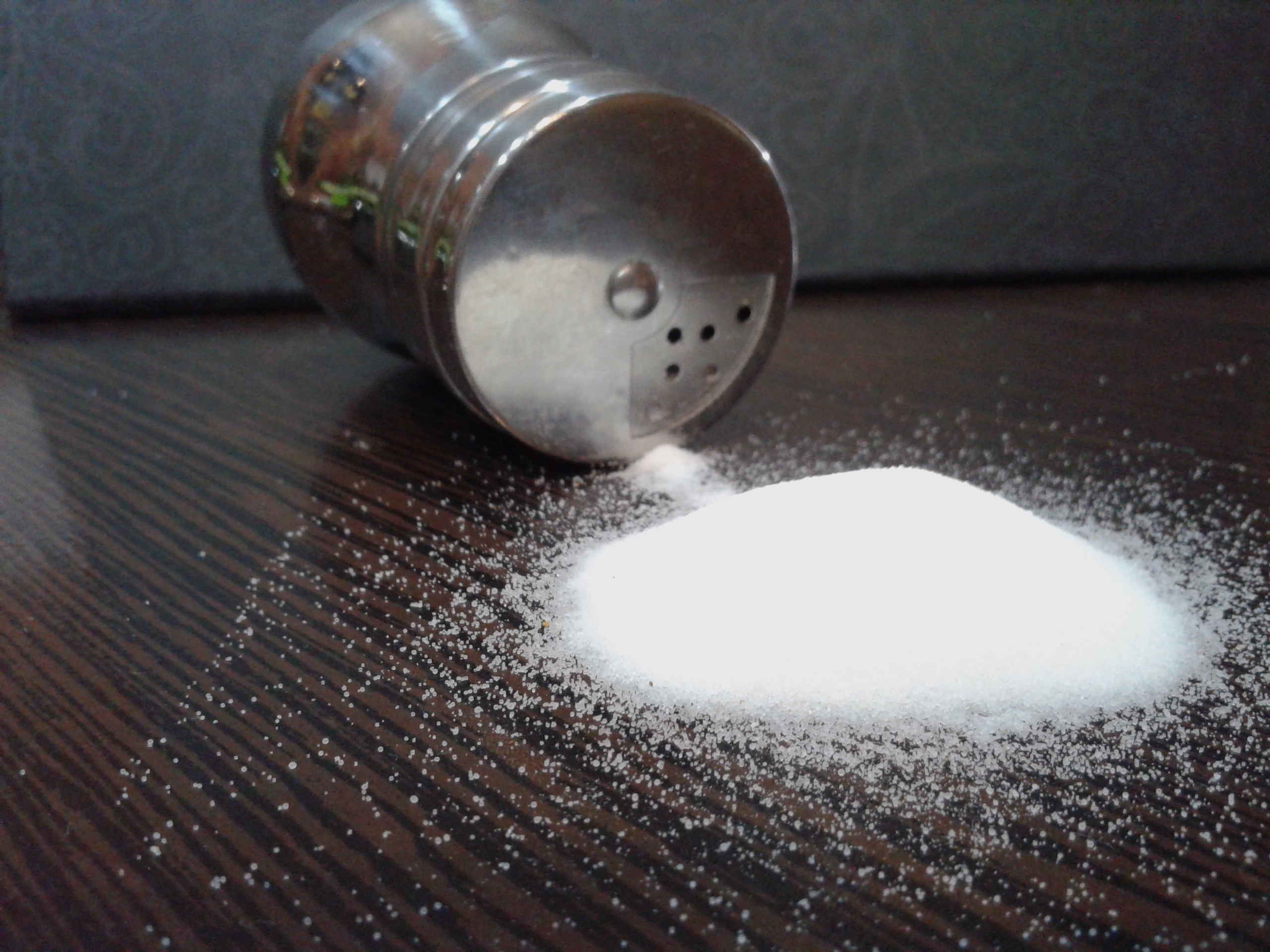 نمایی از پودر نمک خوراکی یا سدیم‌کلرید.